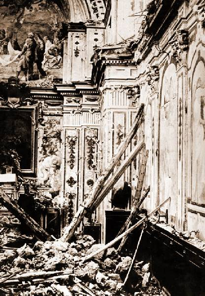 Church Messina Chiesa Nostra Donna della Pietà